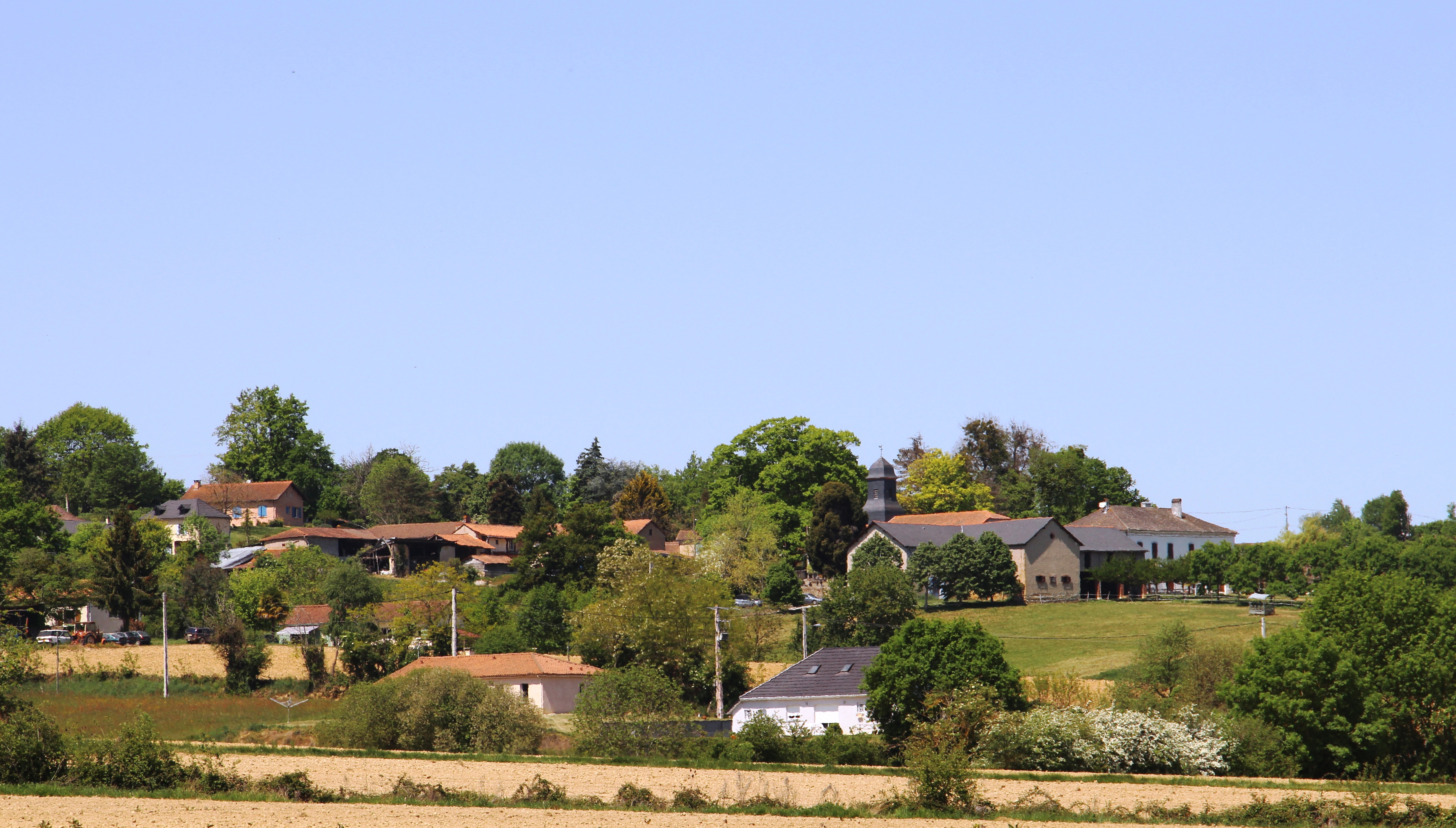 Collongues (Hautes-Pyrénées)